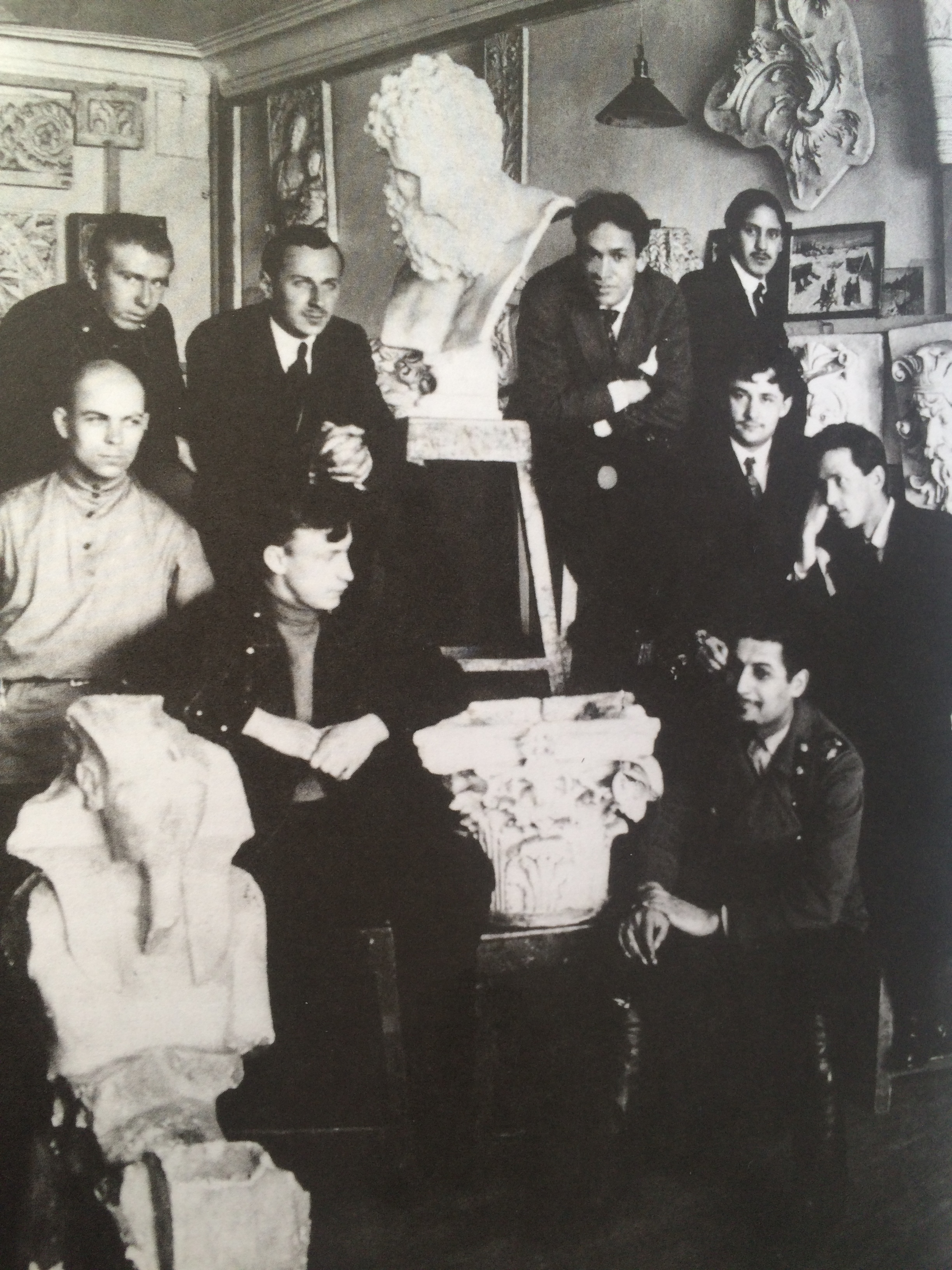 Студенты 2-го курса МУЖВЗ, 1914. Слева направо: верхний ряд - А. Брандуков, П. Мурашко, А. Кеслер, В. Кильдишев; средний ряд - В. Балихин, А. Фомичев, П. Булгаков, Б. Сидоров; внизу - Пуртоянц